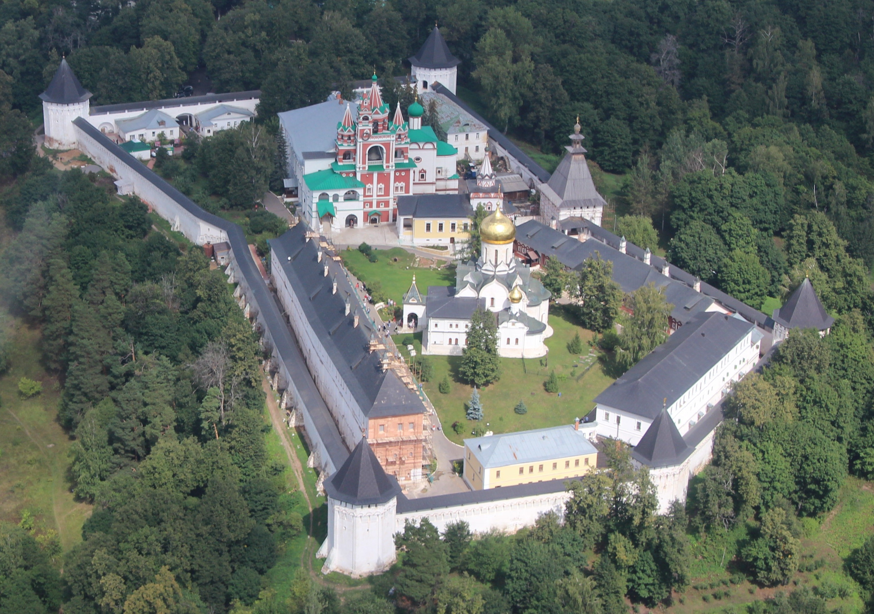 Ансамбль Саввино-Сторожевского монастыря: Саввинская слобода, Звенигород, Московская область